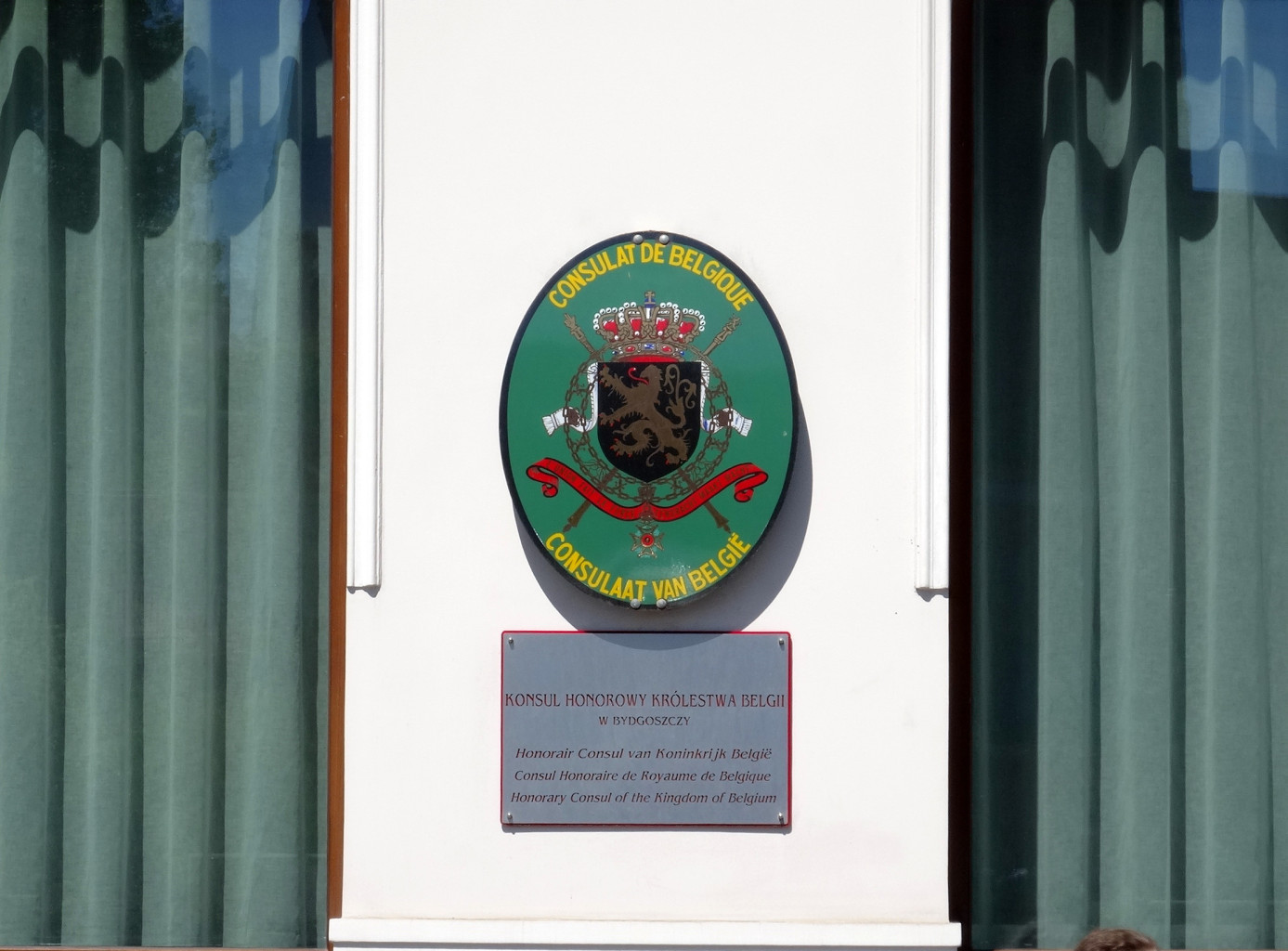 Hotel Sepia (****) w Bydgoszczy przy ul. marszałka Focha oraz konsulat honorowy Belgii w Bydgoszczy